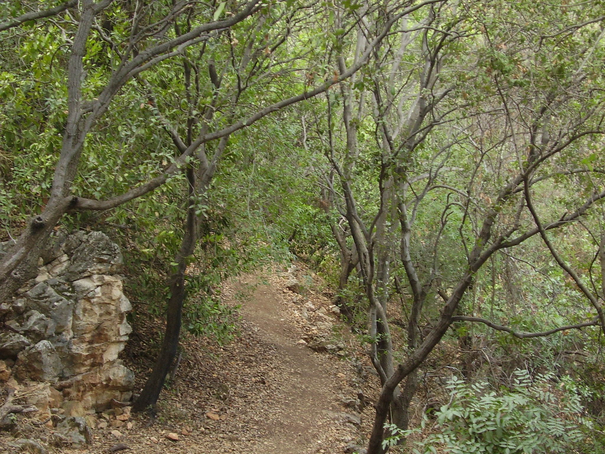 נחל נחש בהר הכרמל Mount Carmel